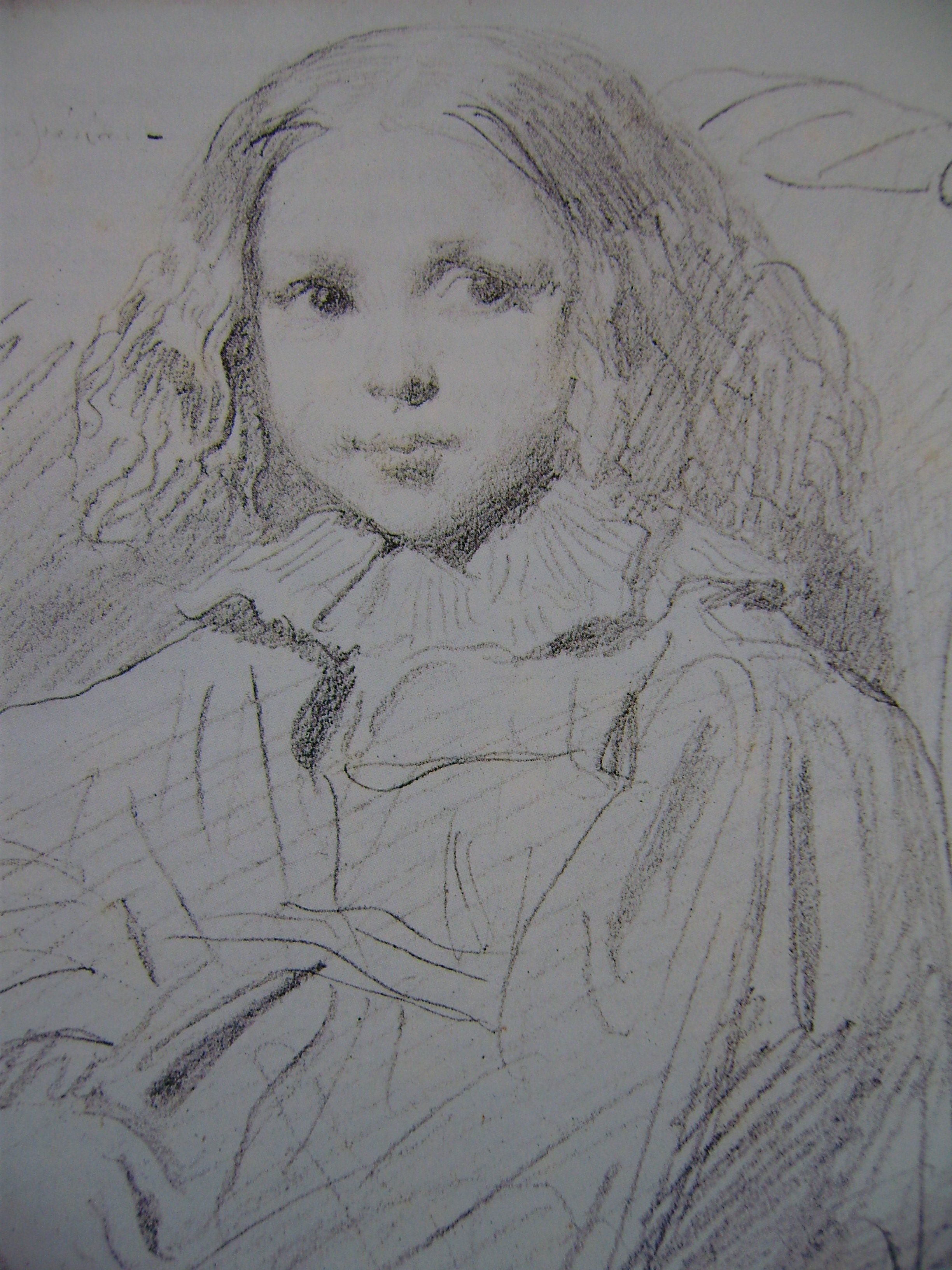 La fille de madame de Prailly (Berthe Chevandier de Valdrome), dessin.